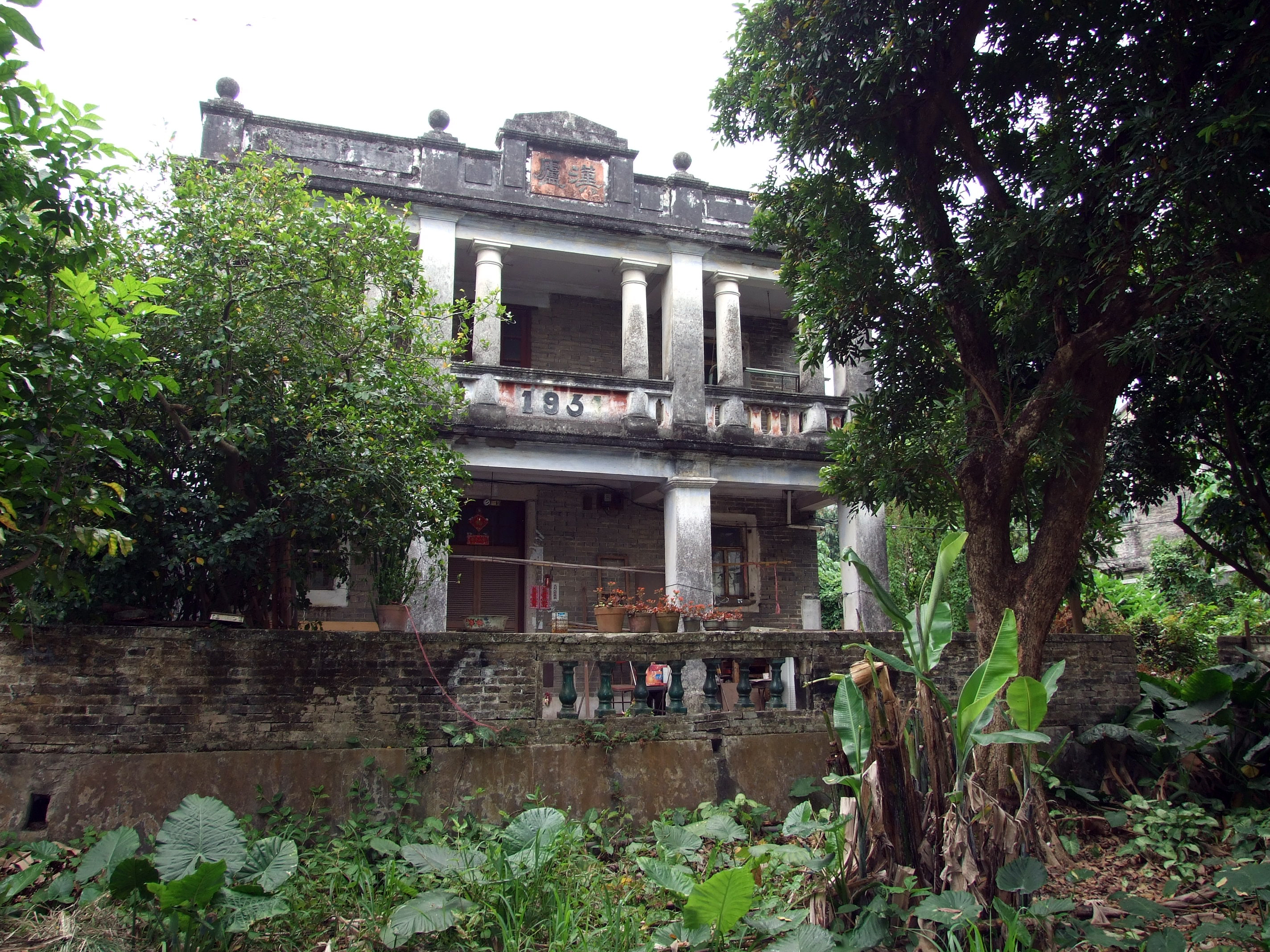 中文（香港）: 新圍村61號漢廬